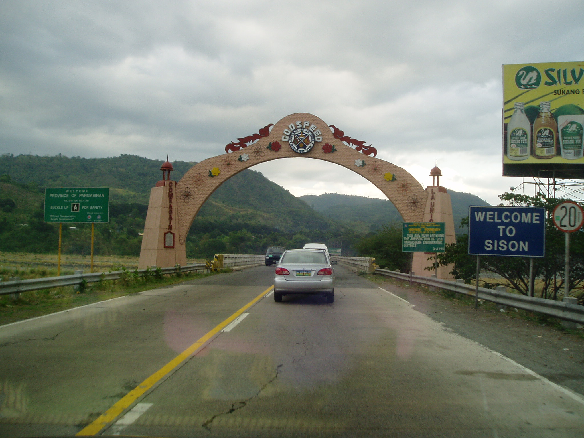 Tagalog: Hangganan ng La Union at Pangasinan. Aking gawa.